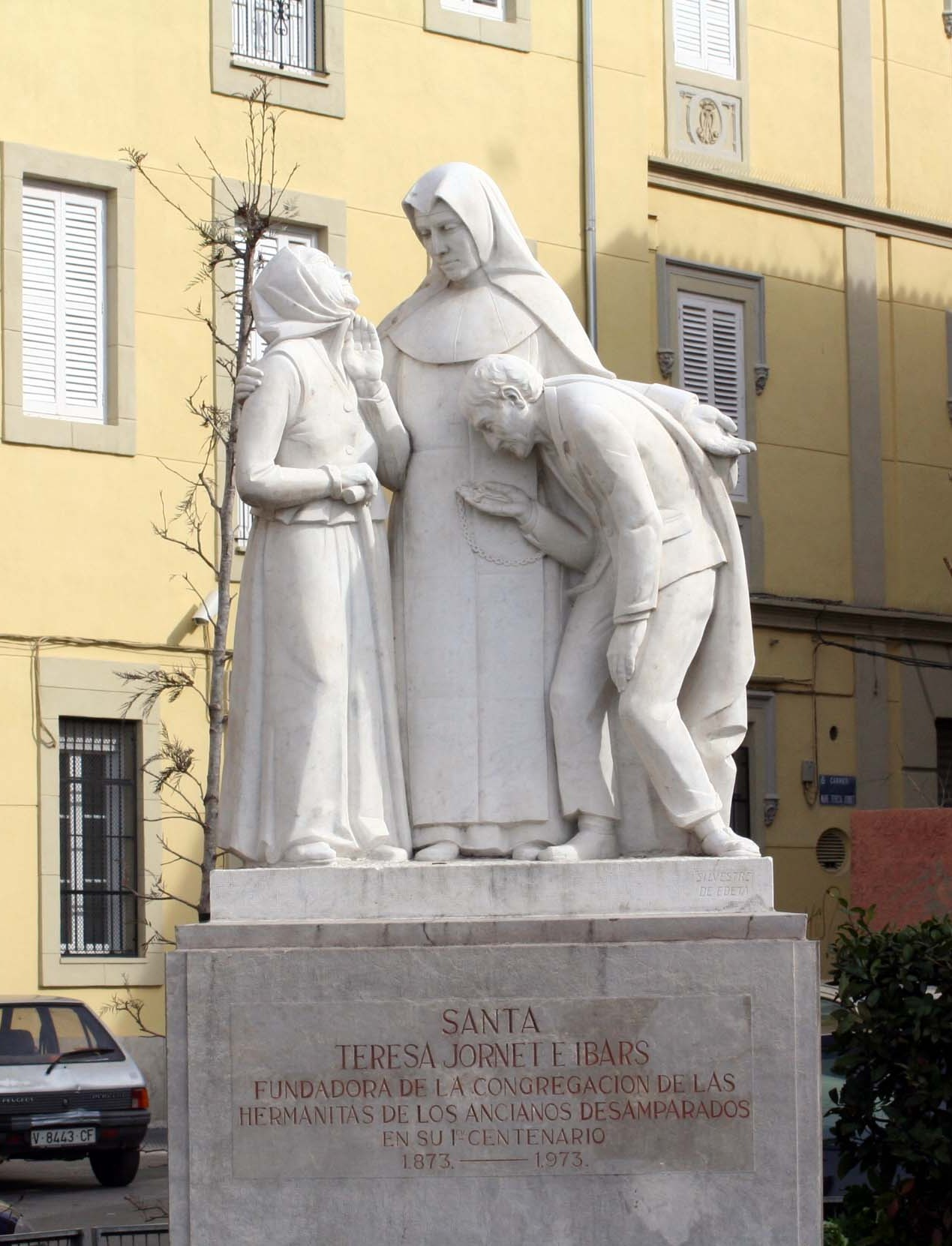 Monumento a Santa Teresa Jornet, en Valencia, junto a un asilo de las Hermanitas de los ANcianos Desamparados